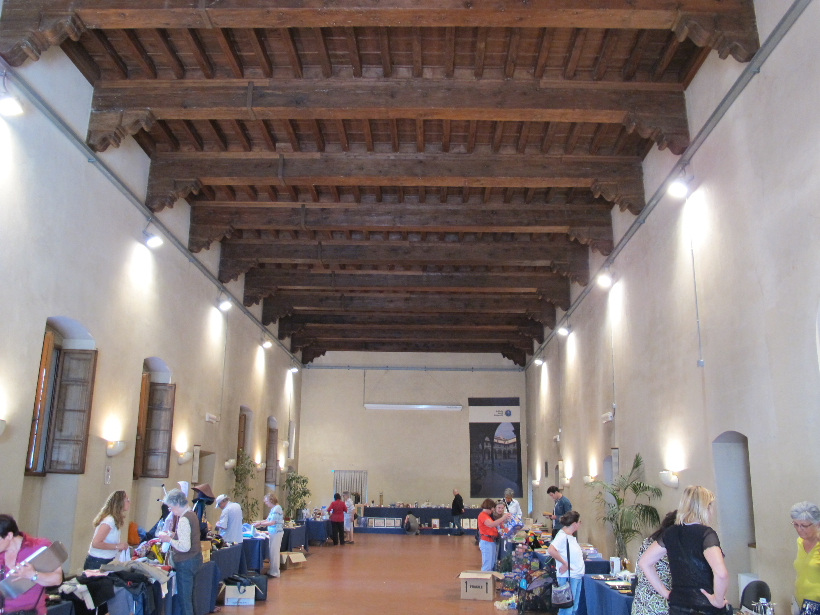 Spedale degli innocenti, sala